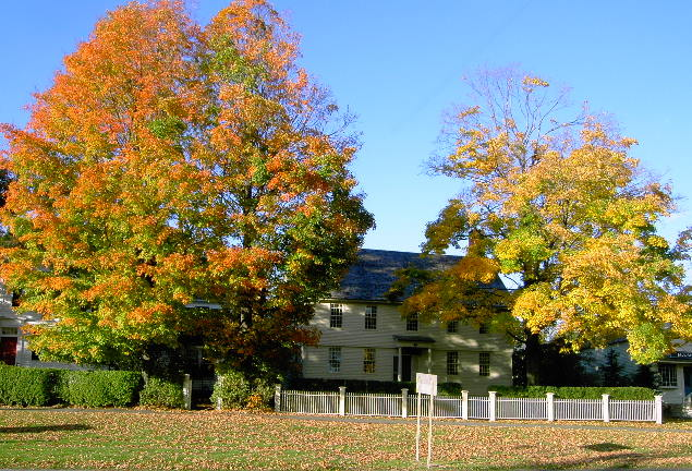 Indian Summer; Litchfield, Connecticut, USA